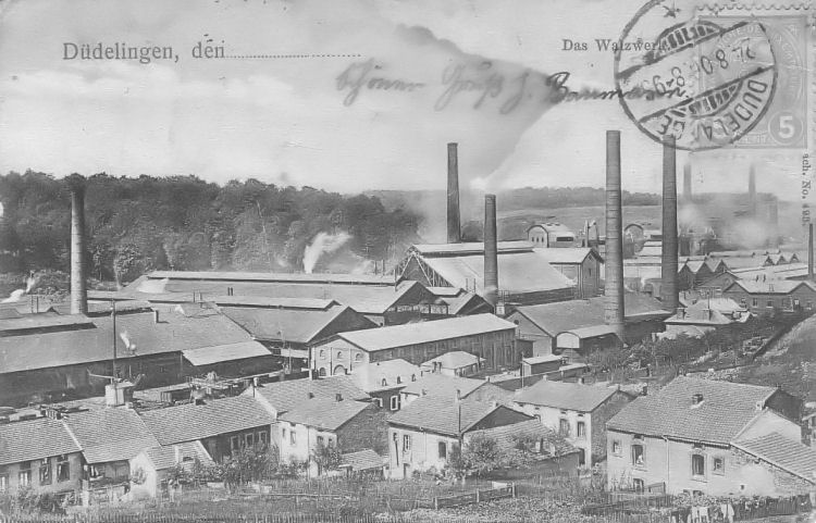 Le laminoir de l'usine de Dudelange, par J.M. Bellwald